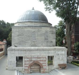 Abdülbaki Paşa Darul Kurrası- Zeytinburnu